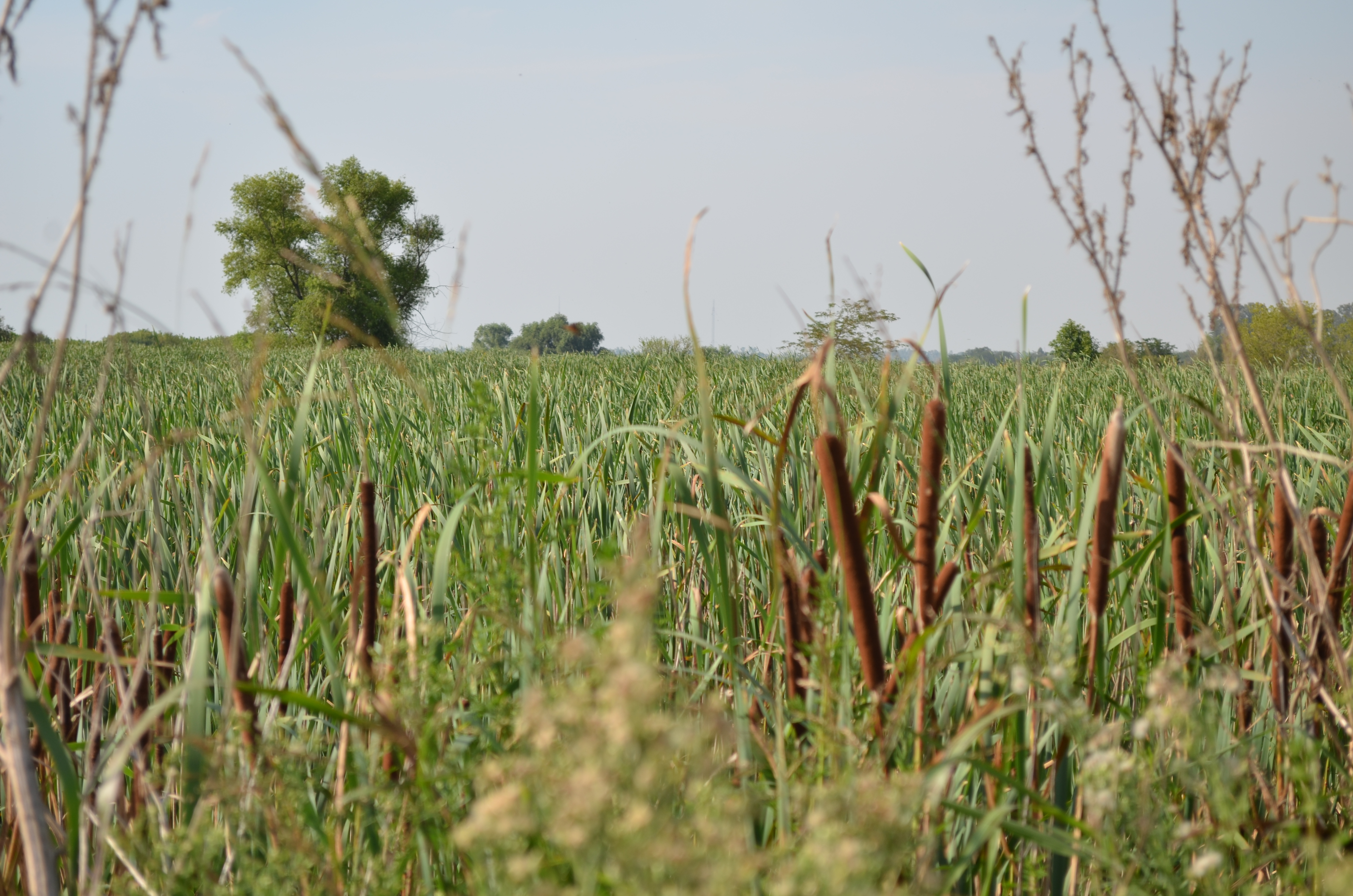 Juncos y Totoras en la Reserva Natural Integral y Mixta Laguna de Rocha